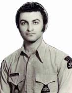 نمونه لباس فرم تکنسین فوریتهای پزشکی در بدو تاسیس اورژانس